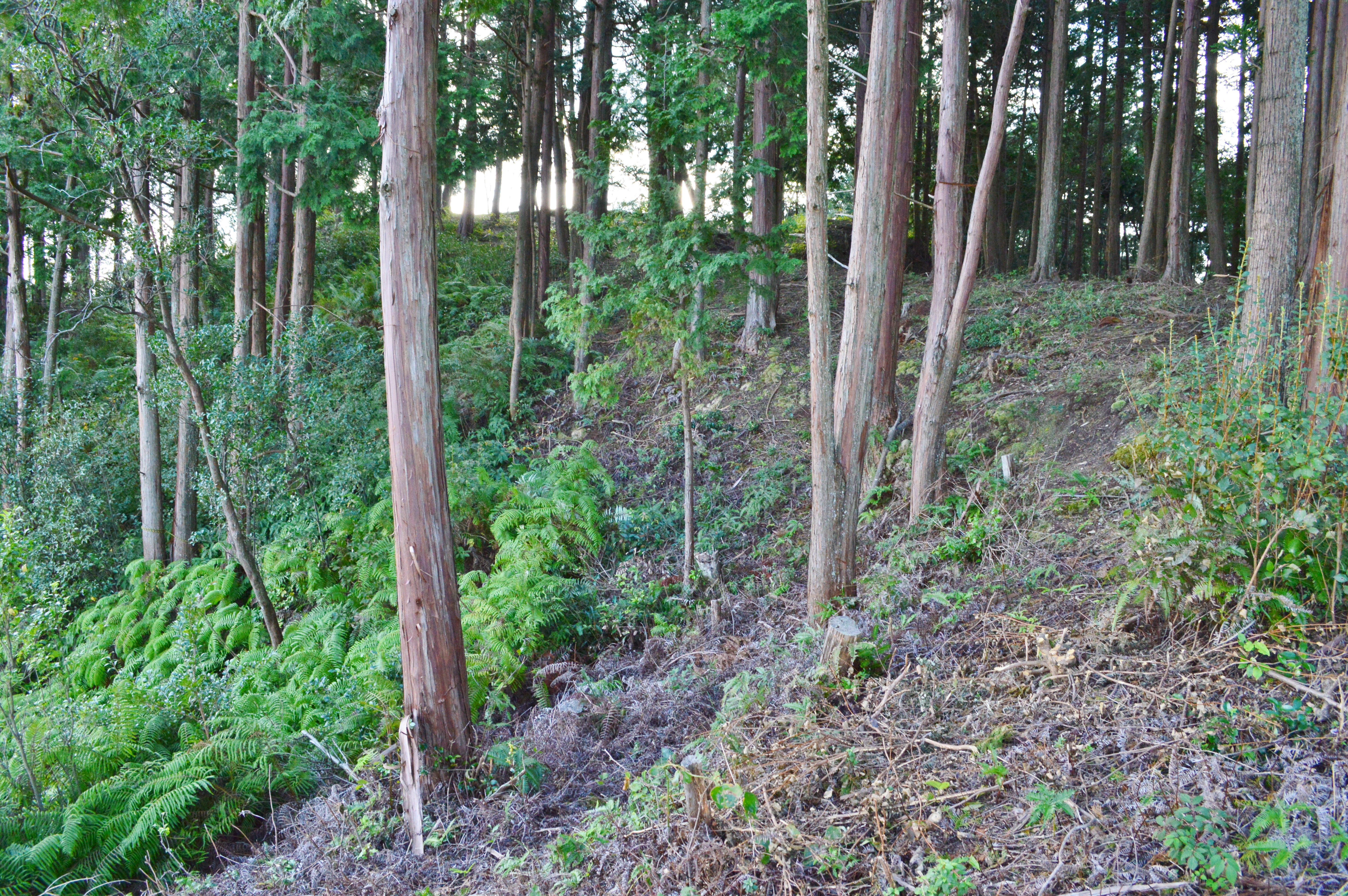 雪野山古墳 墳丘